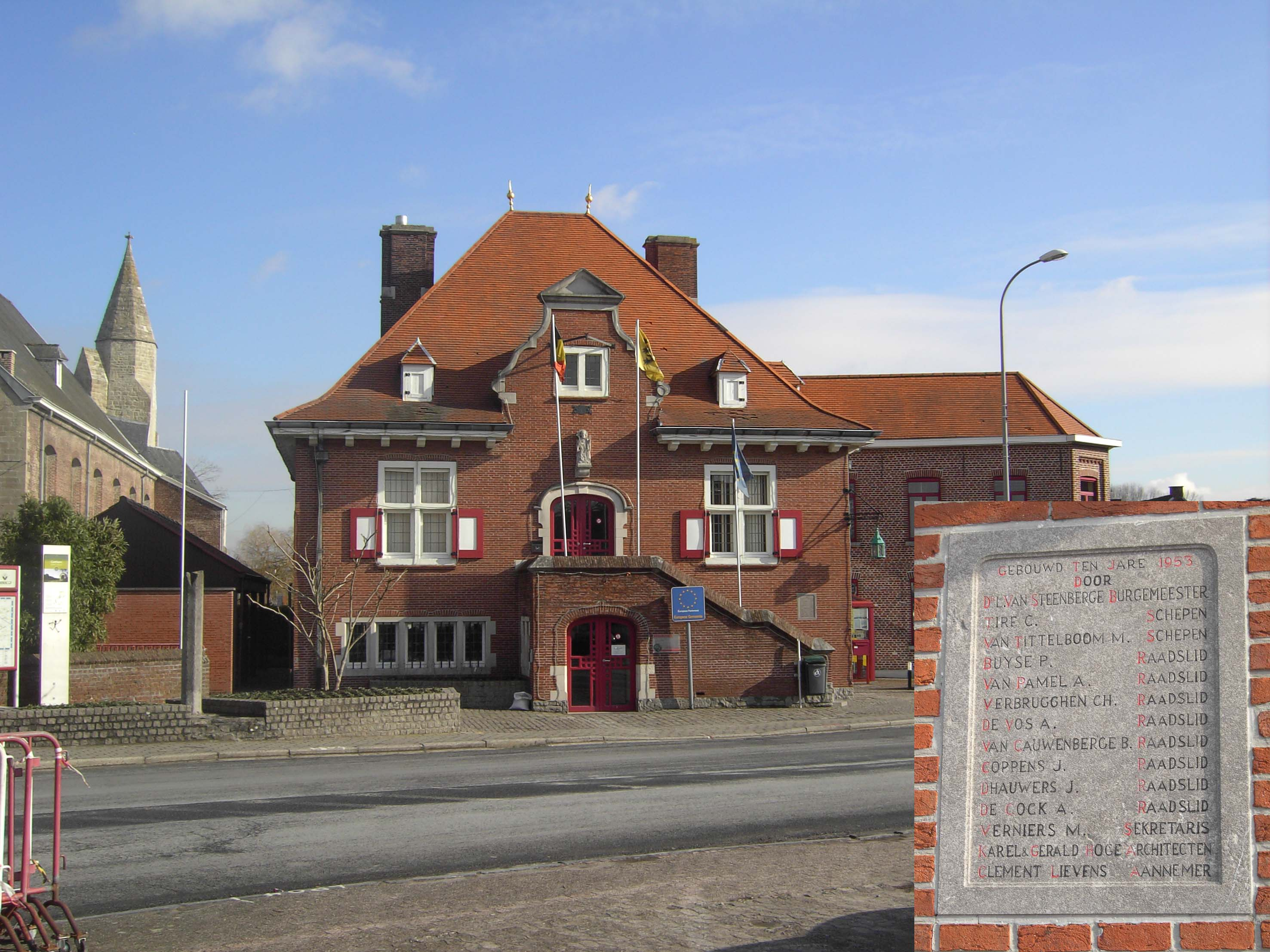 Gemeentehuis van Sint-Lievens-Houtem - op de insteek de namen van de betrokken personen bij de bouw in 1953 - Oost-Vlaanderen - België